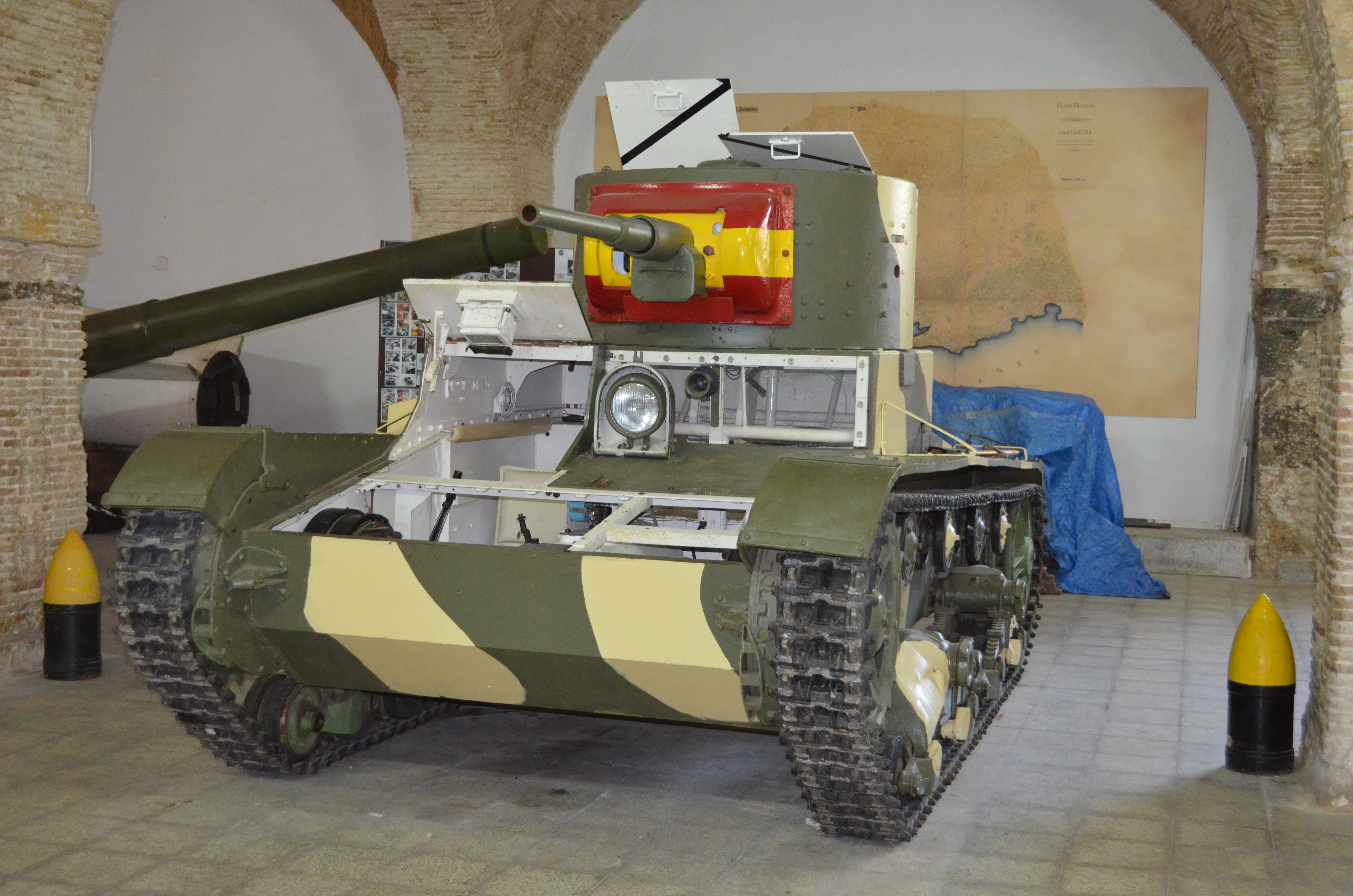 T-26B